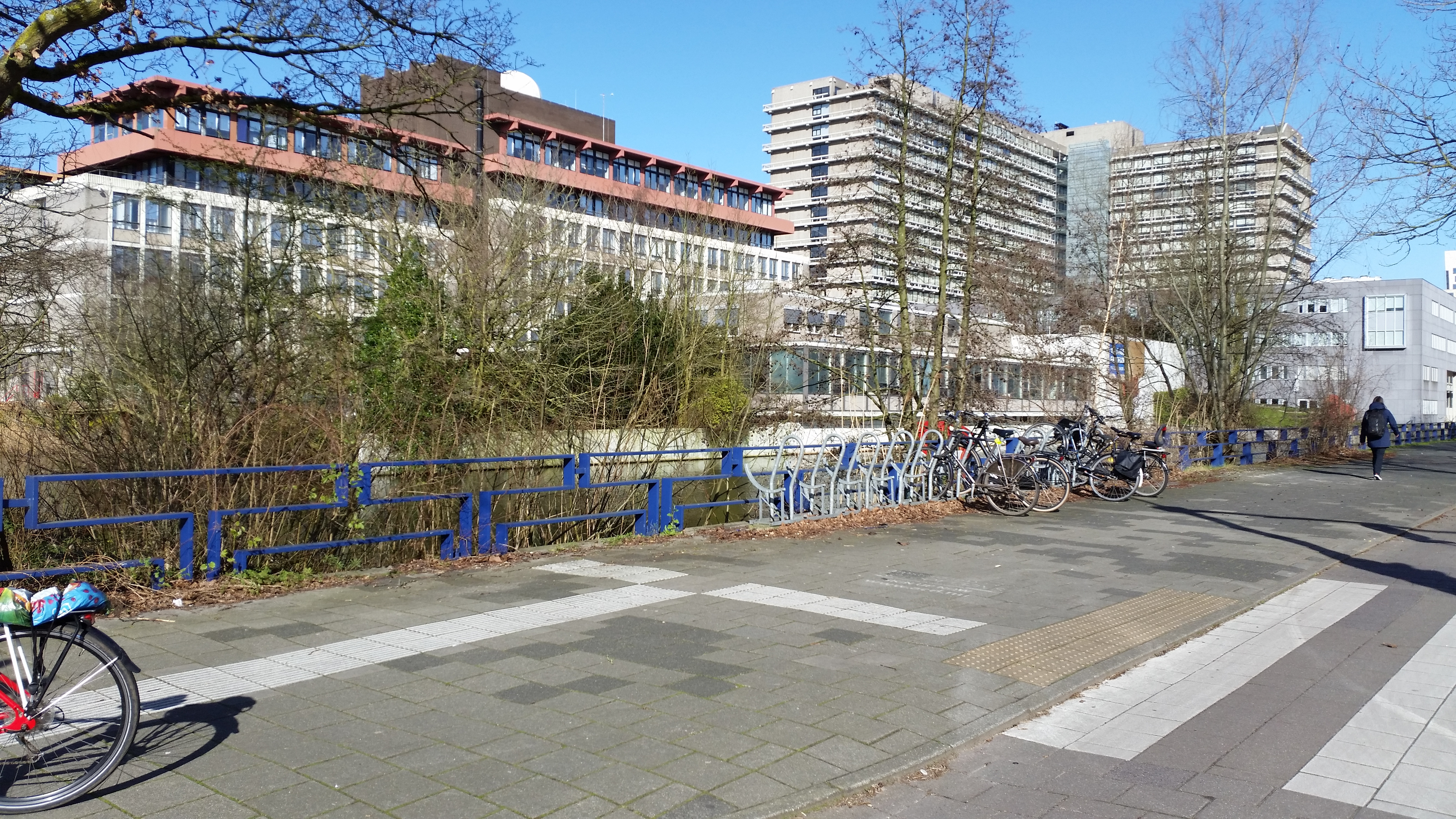 Impressie van Burg 804 in de Buitenveldertselaan, Amsterdam-Zuid. De brug is nauwelijks zichtbaar, maar heeft aan de westzijde een hele lange leuning. (maart 2020)